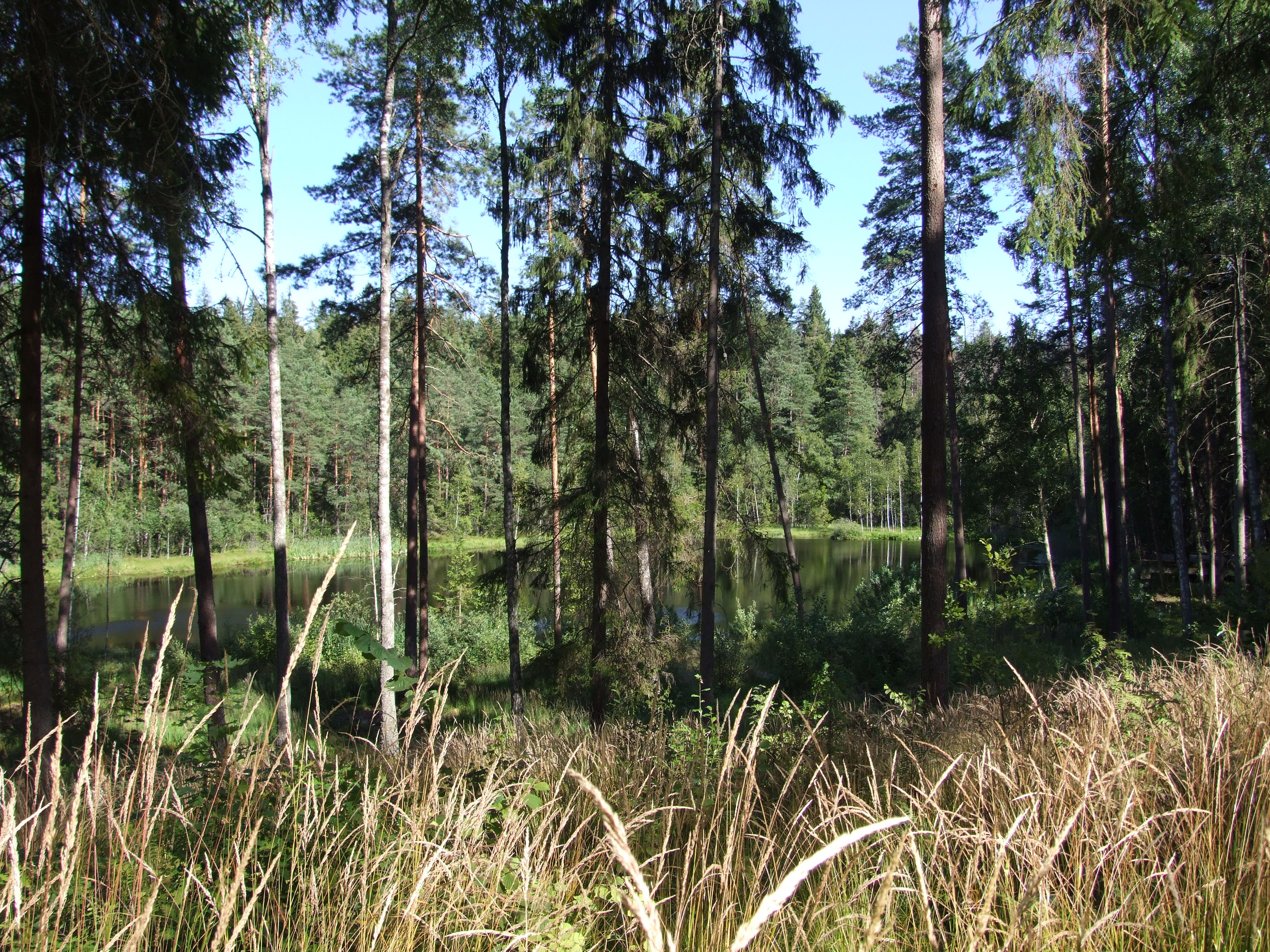 Kategorija:Baldones novada ezeri